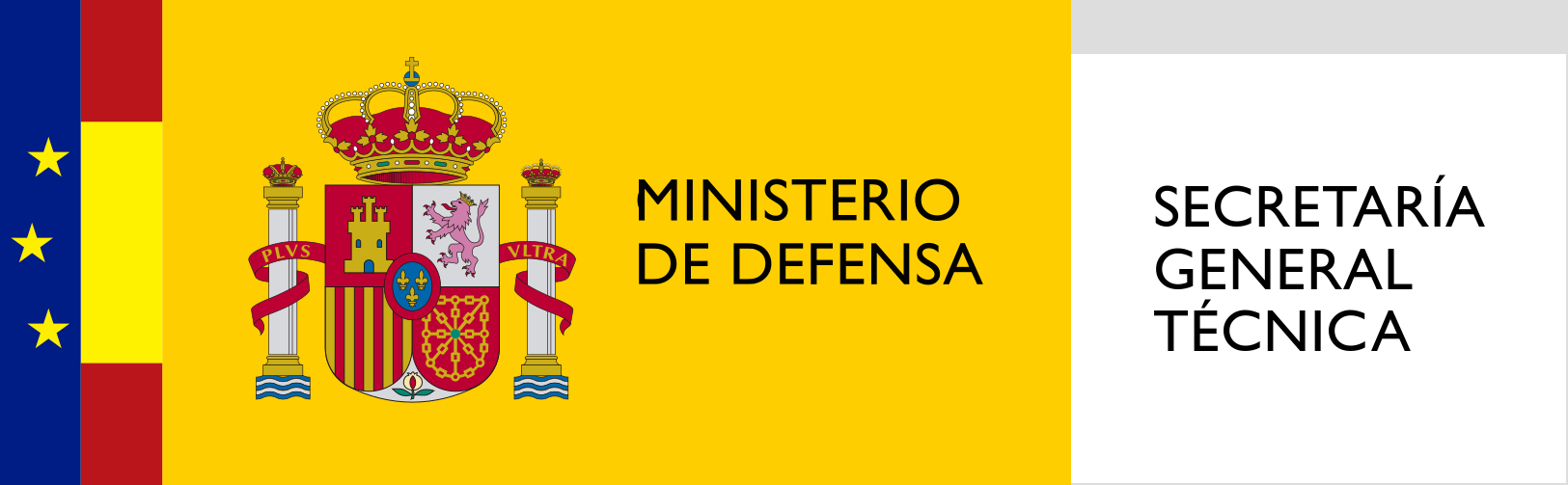 Logotipo de la Secretaría General Técnica del Ministerio de Defensa de España